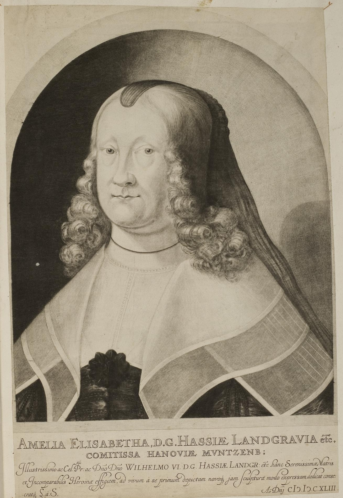 Grafik aus dem Klebeband Nr. 1 der Fürstlich Waldeckschen Hofbibliothek Arolsen Motiv: Amalie Elisabeth von Hanau-Münzenberg, Ehefrau von Landgraf Wilhelm V. von Hessen-Kassel